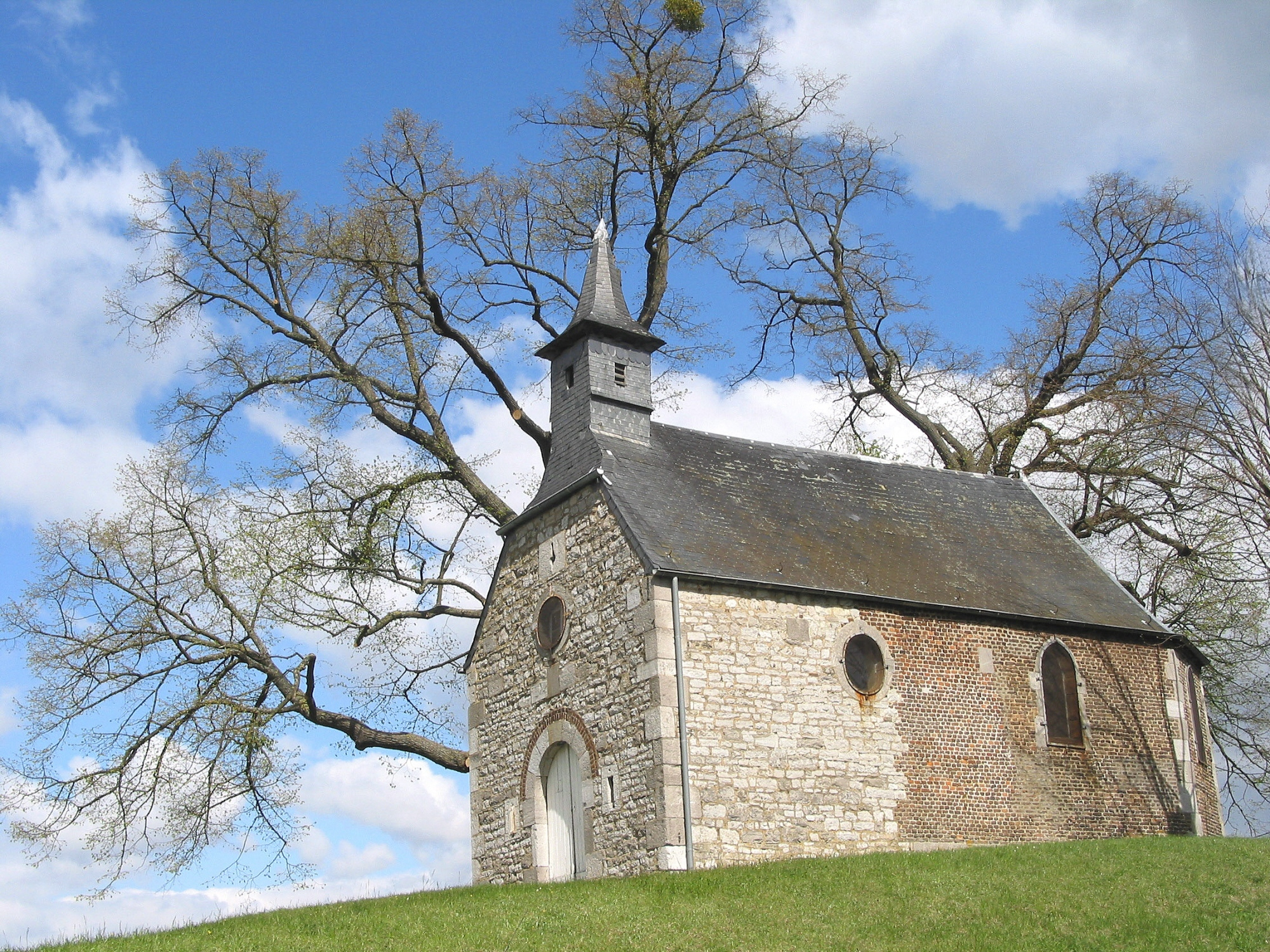 Floreffe, la chapelle Saint-Roch (1632) et ses arbres à clous (Tilleuls communs).